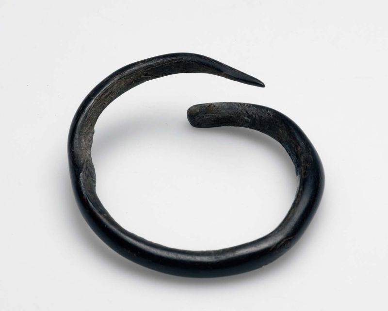 Polssieraad. Akar bahar polsring